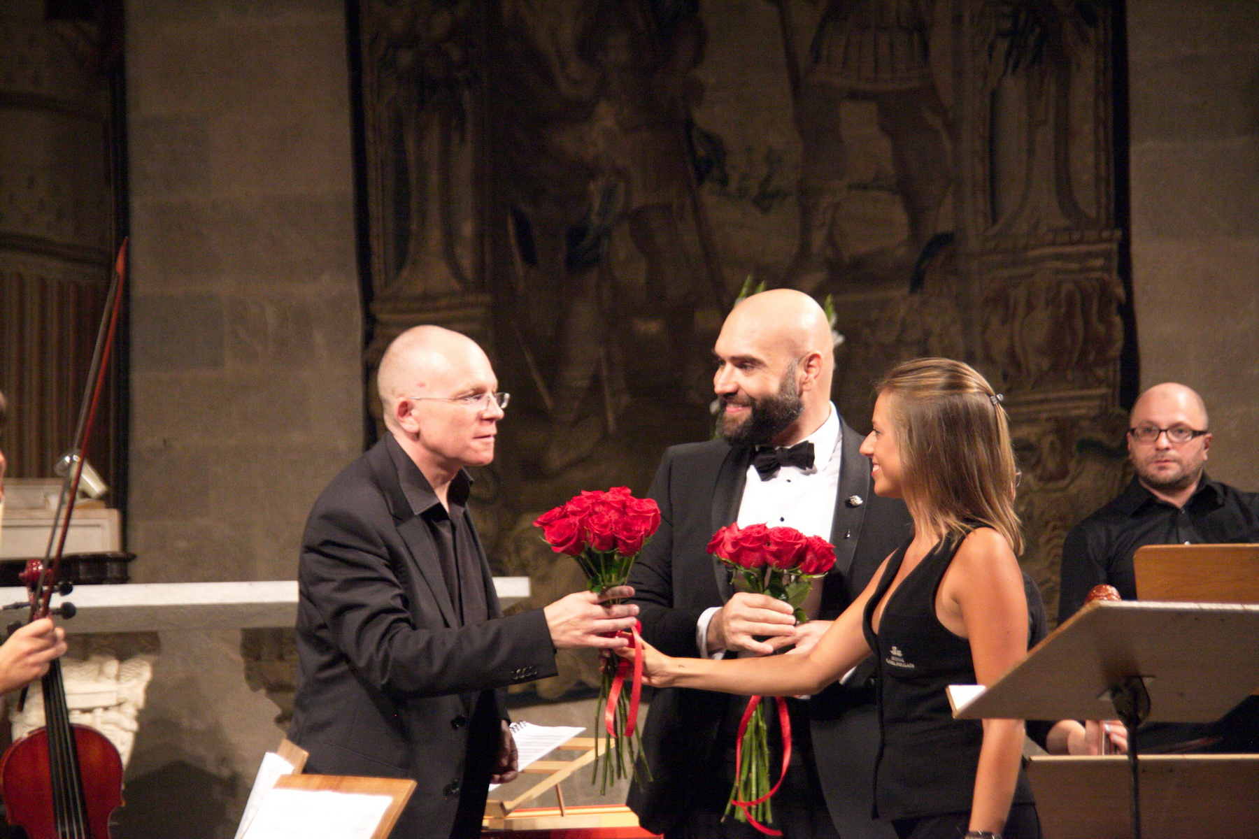 El contratenor Xavier Sabata acompanyat de la Capella Cracoviensis, en l'estrena de "Alexandre el Gran" al Festival de Peralada de 2016